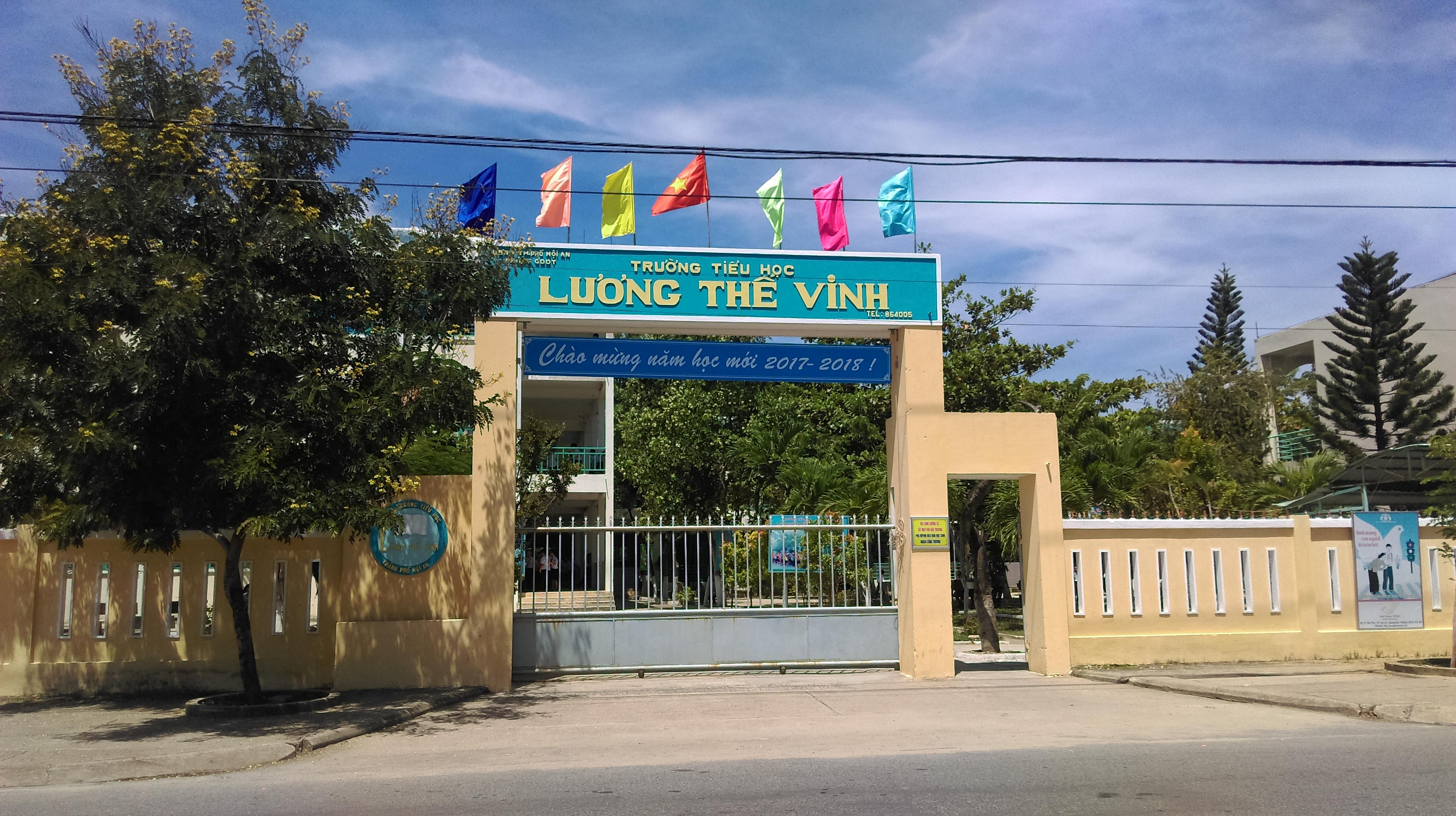 Trường Tiểu học Lương Thế Vinh, Tân An, Hội An, Quảng Nam